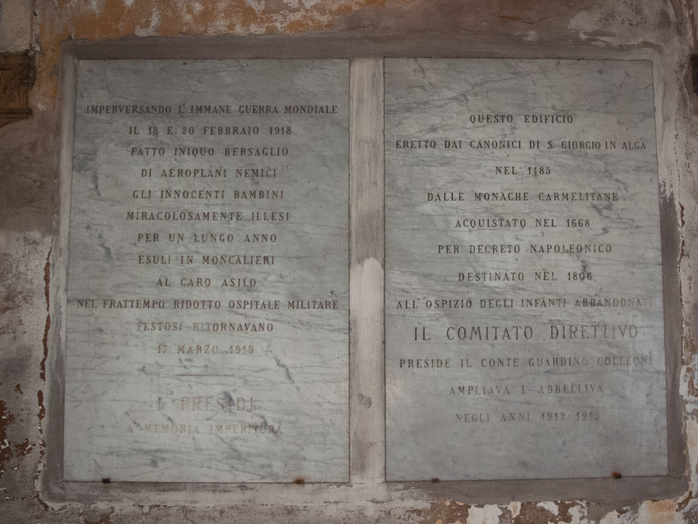 Lapidi